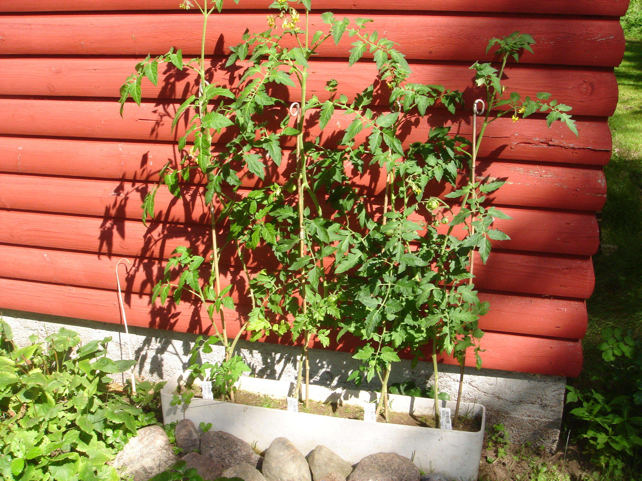 Tomatoes